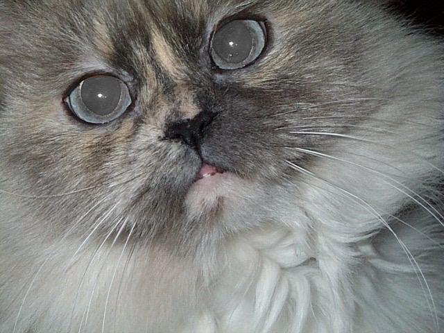 Our Himalayan.